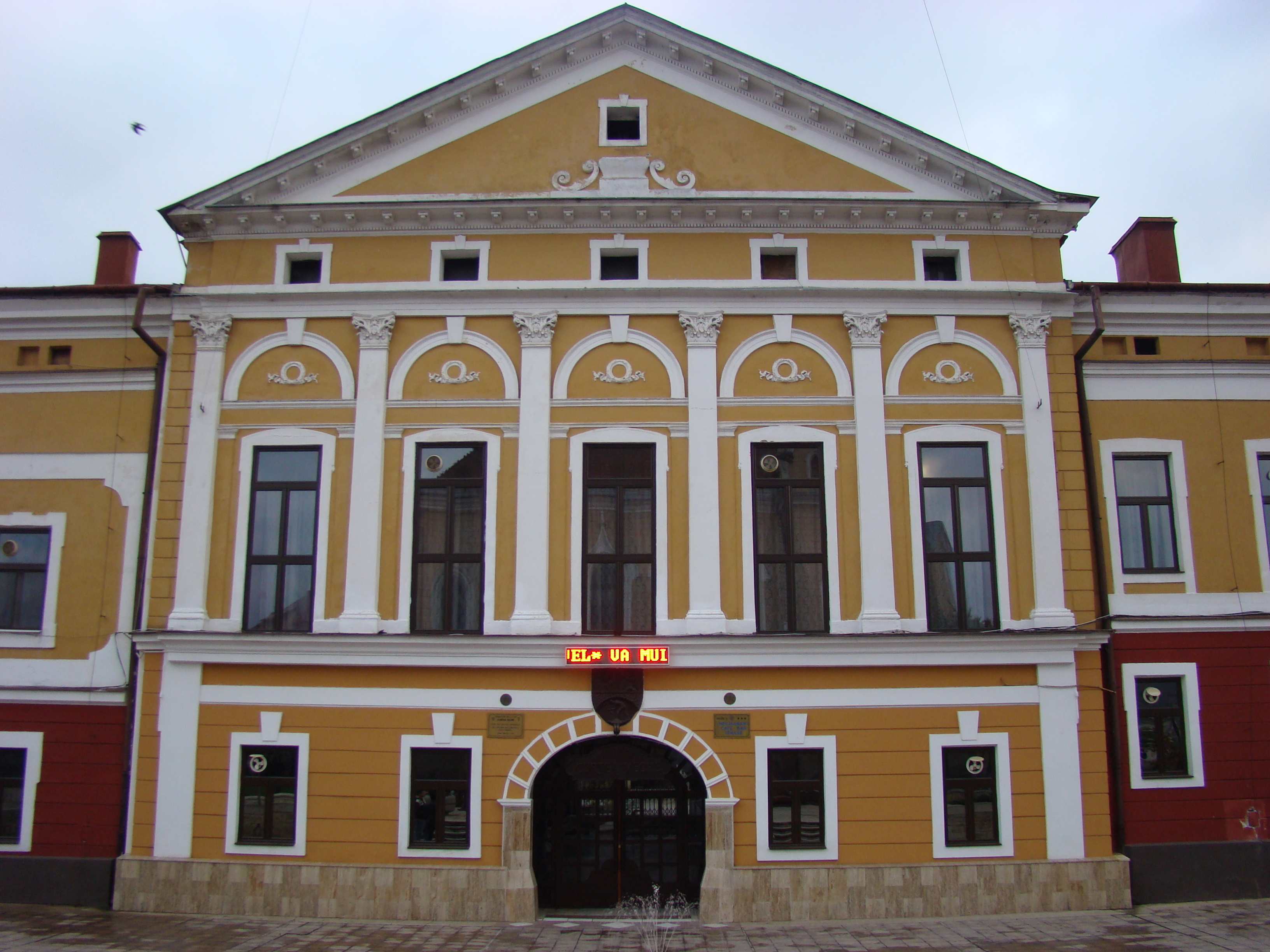 Fosta Prefectură a comitatului Maramureș, azi restaurant "Curtea Veche"